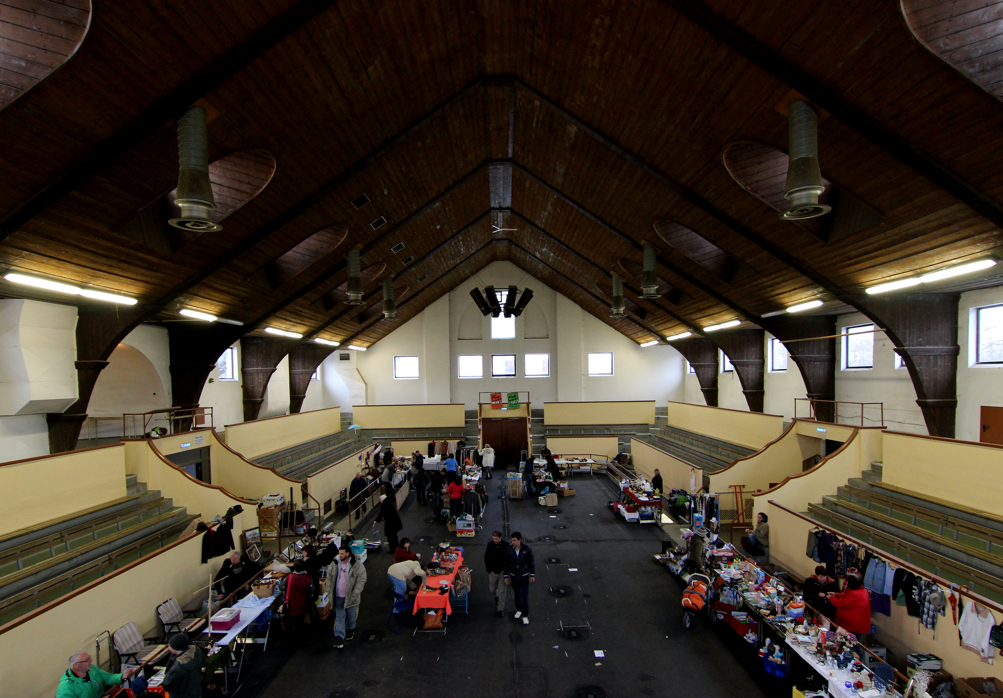 Allgäuhalle in Kempten Innenansicht mit Deckenkonstruktion des Hauptgebäudes (Flohmarkttag)